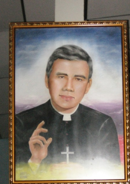 Un Retrato del padre Rutilio Grande